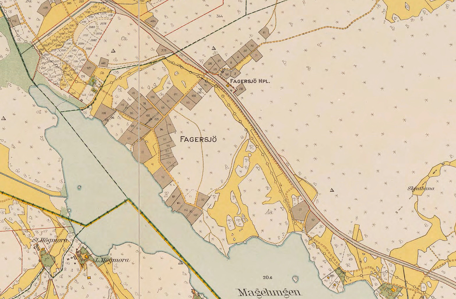 Del av Kartblad ”Södertörns villastad” ur Stockholms stad med omnejd i 12 blad. Plankartan är upprättad 1917-1926 av H. Hellberg och A. E. Påhlman. Tryckår 1926.